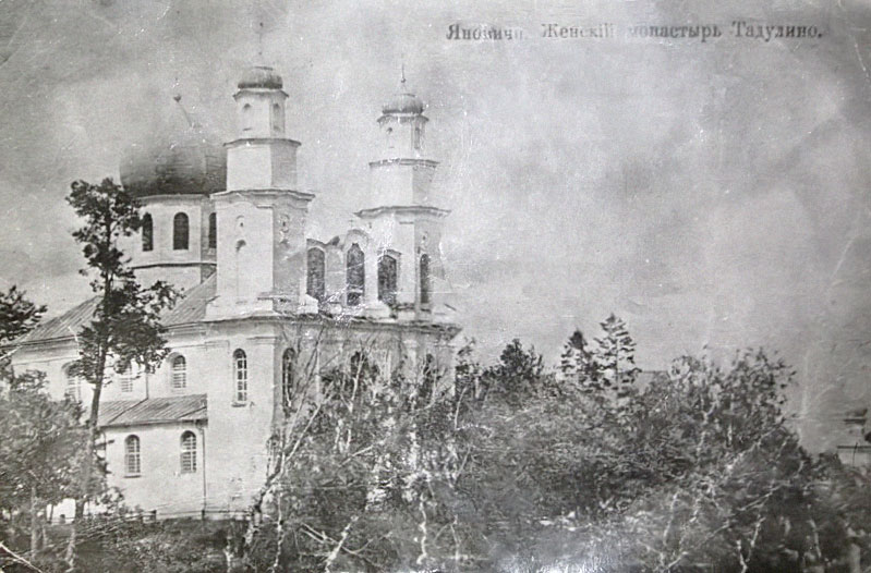 Беларуская (тарашкевіца): Тадулінскі (Tadulin) манастыр каля мястэчка Янавічаў (Janavičy)